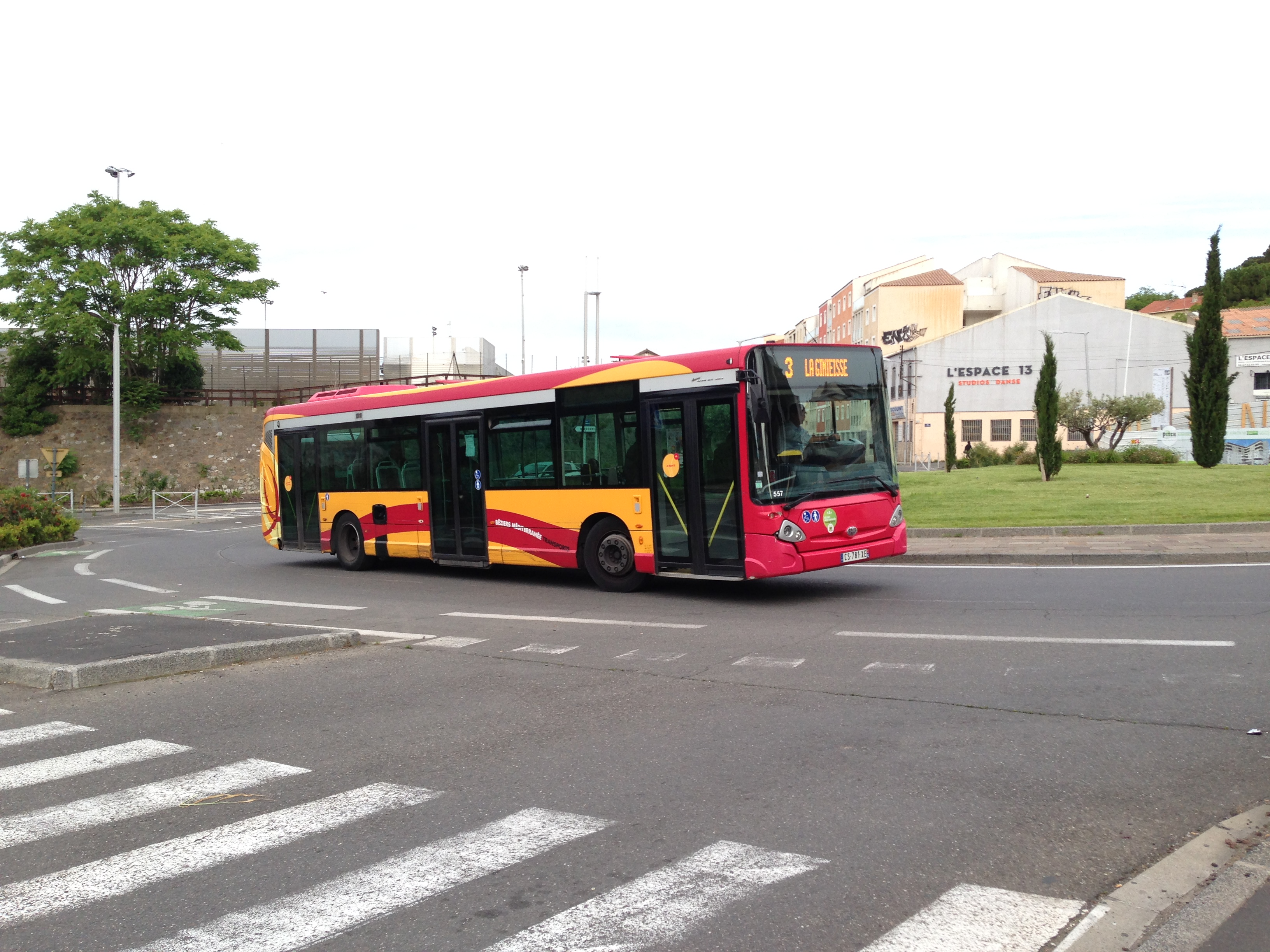 Le bus ligne 3 du réseau beeMob